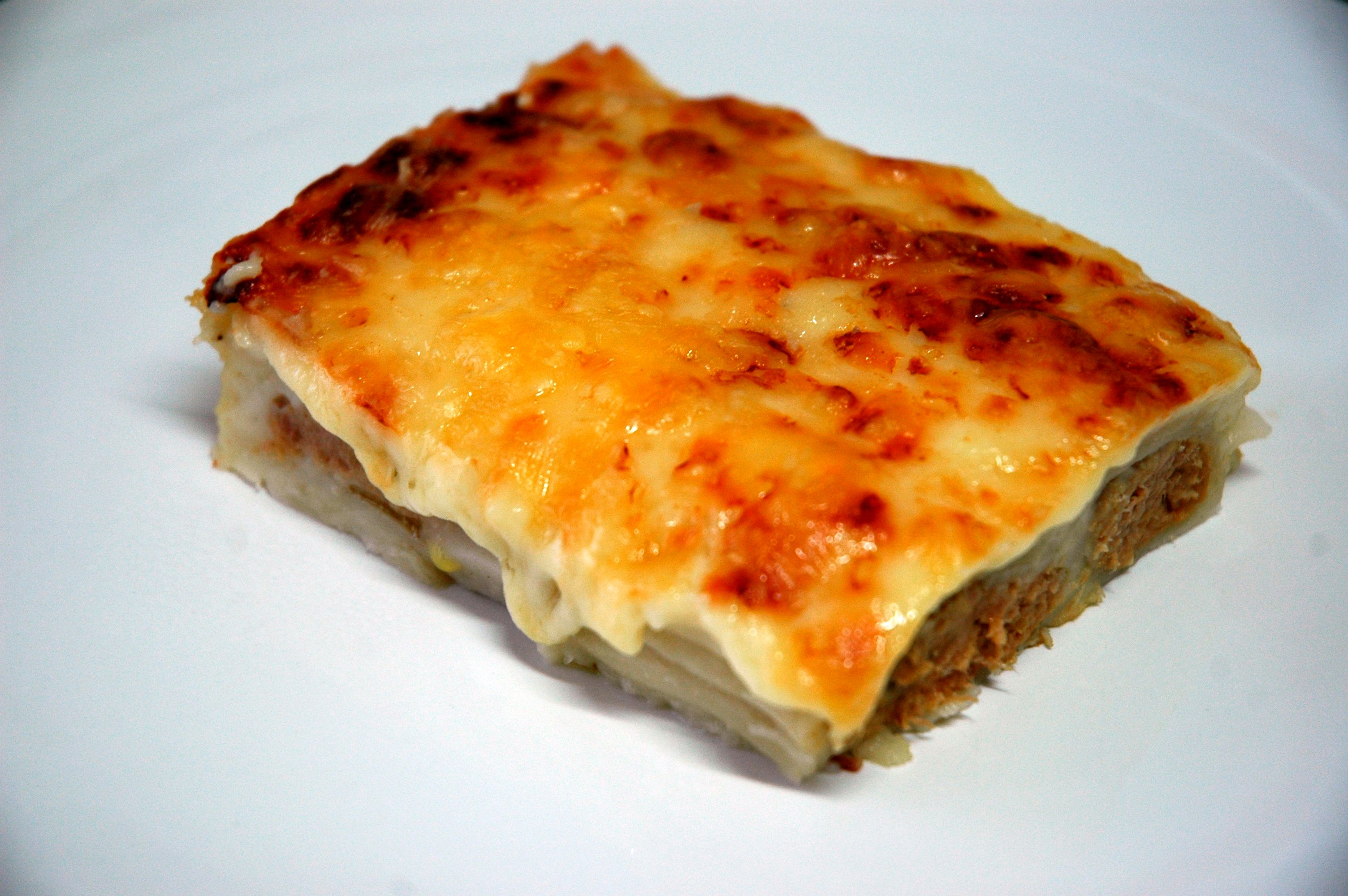 Canelons